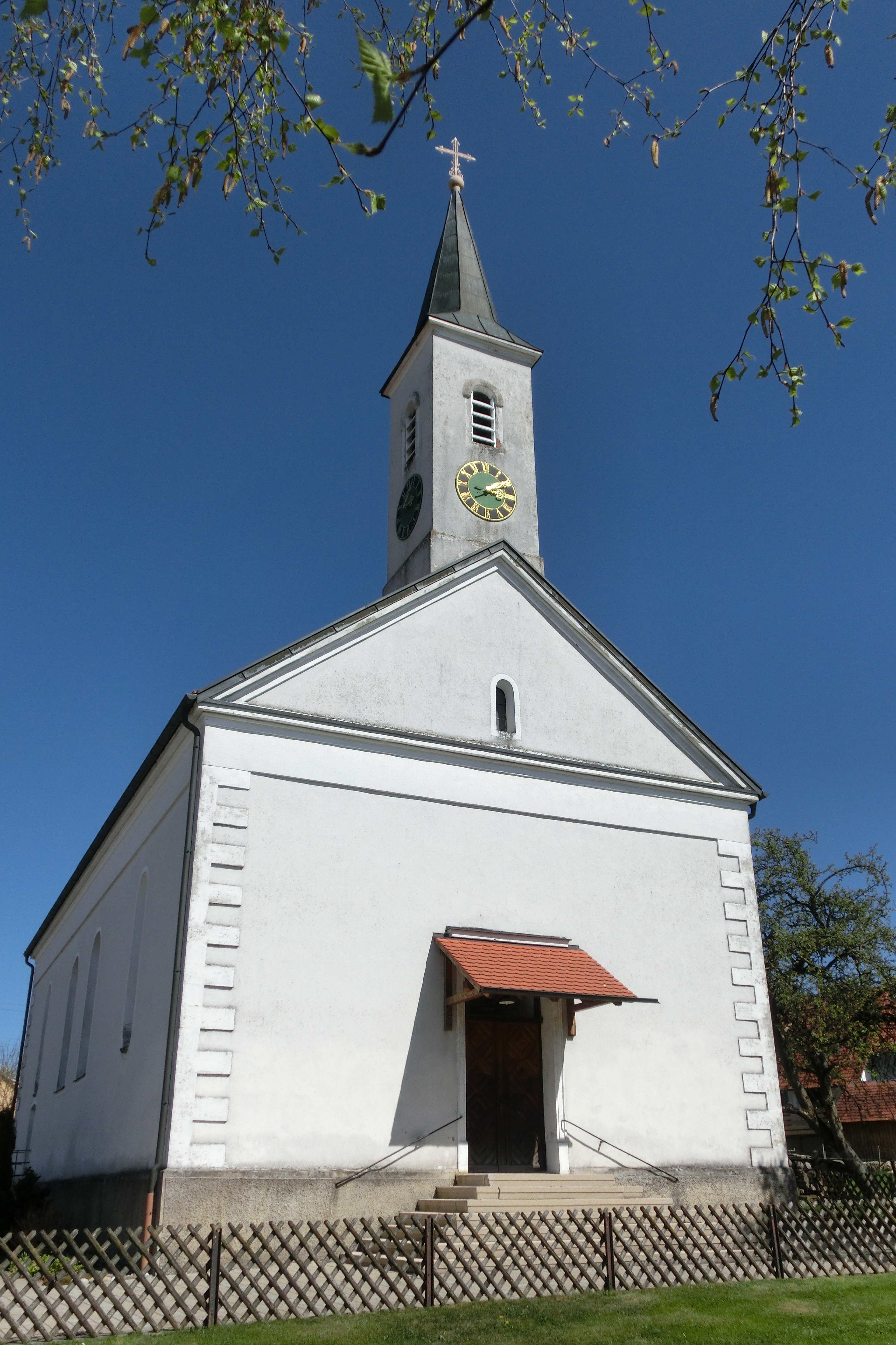 Deutschland - Baden-Württemberg - Landkreis Sigmaringen - Ostrach - Tafertsweiler: Pfarrkirche St. Urban